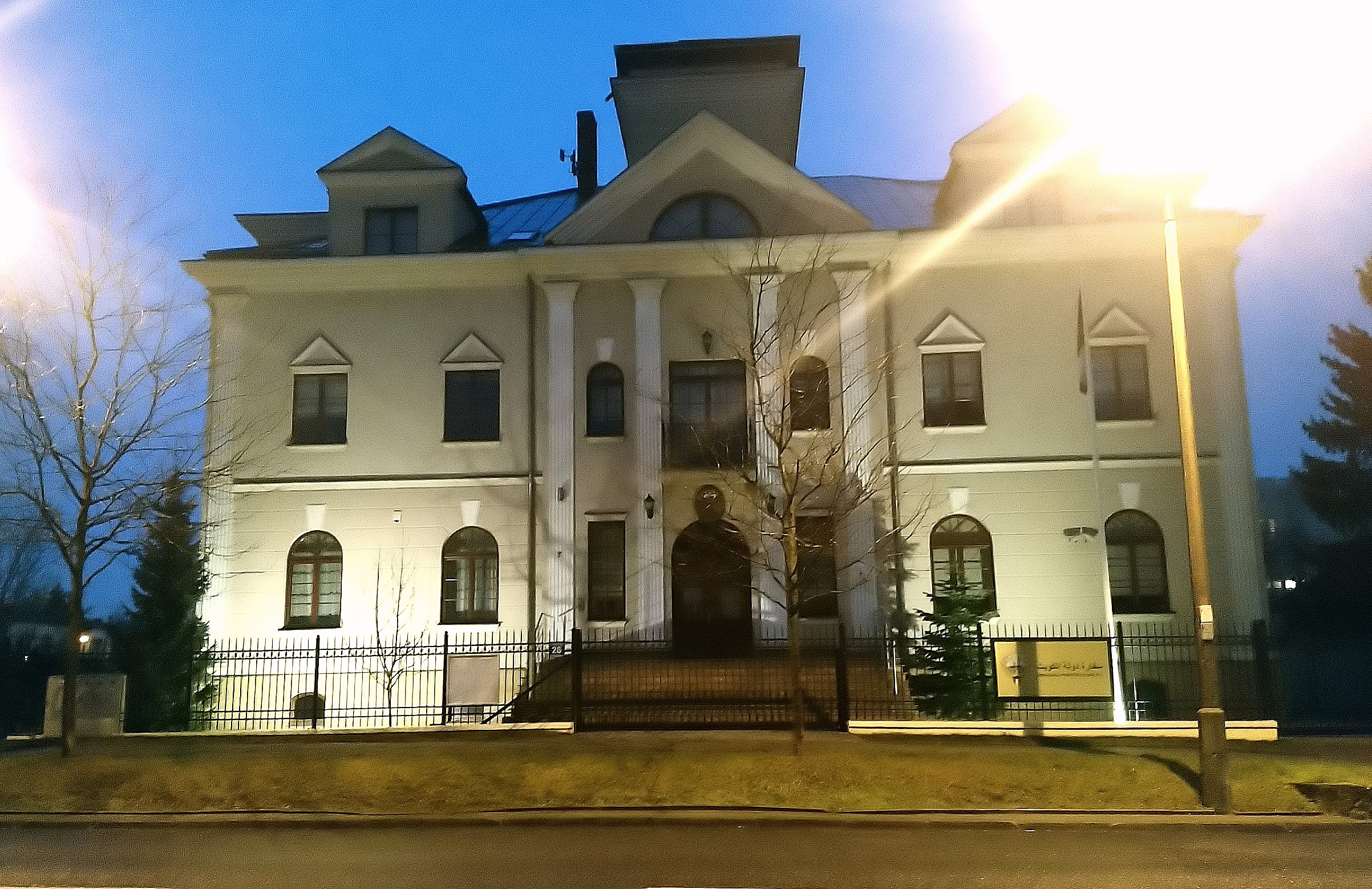 Ambasada Kuwejtu w Warszawie